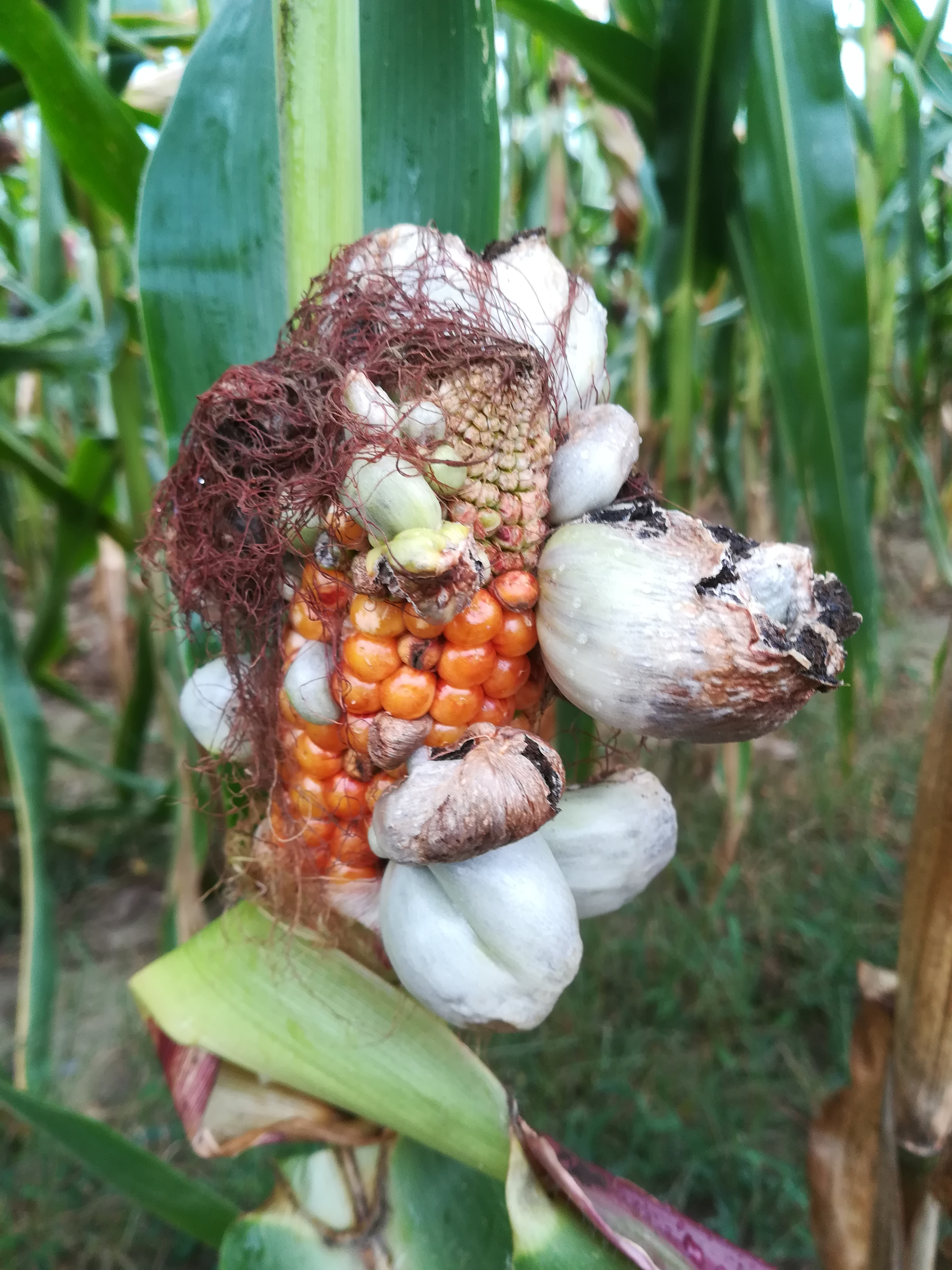 Cmentarz w Buku. Choroba kukurydzy.